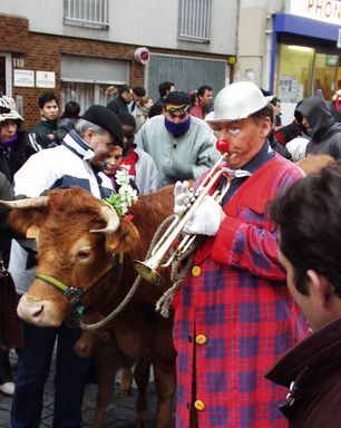 Carnaval de Paris 2004 - La vache Pimprenelle avec Pat le Clown, en tête du cortège de la Promenade du Boeuf Gras 2004.